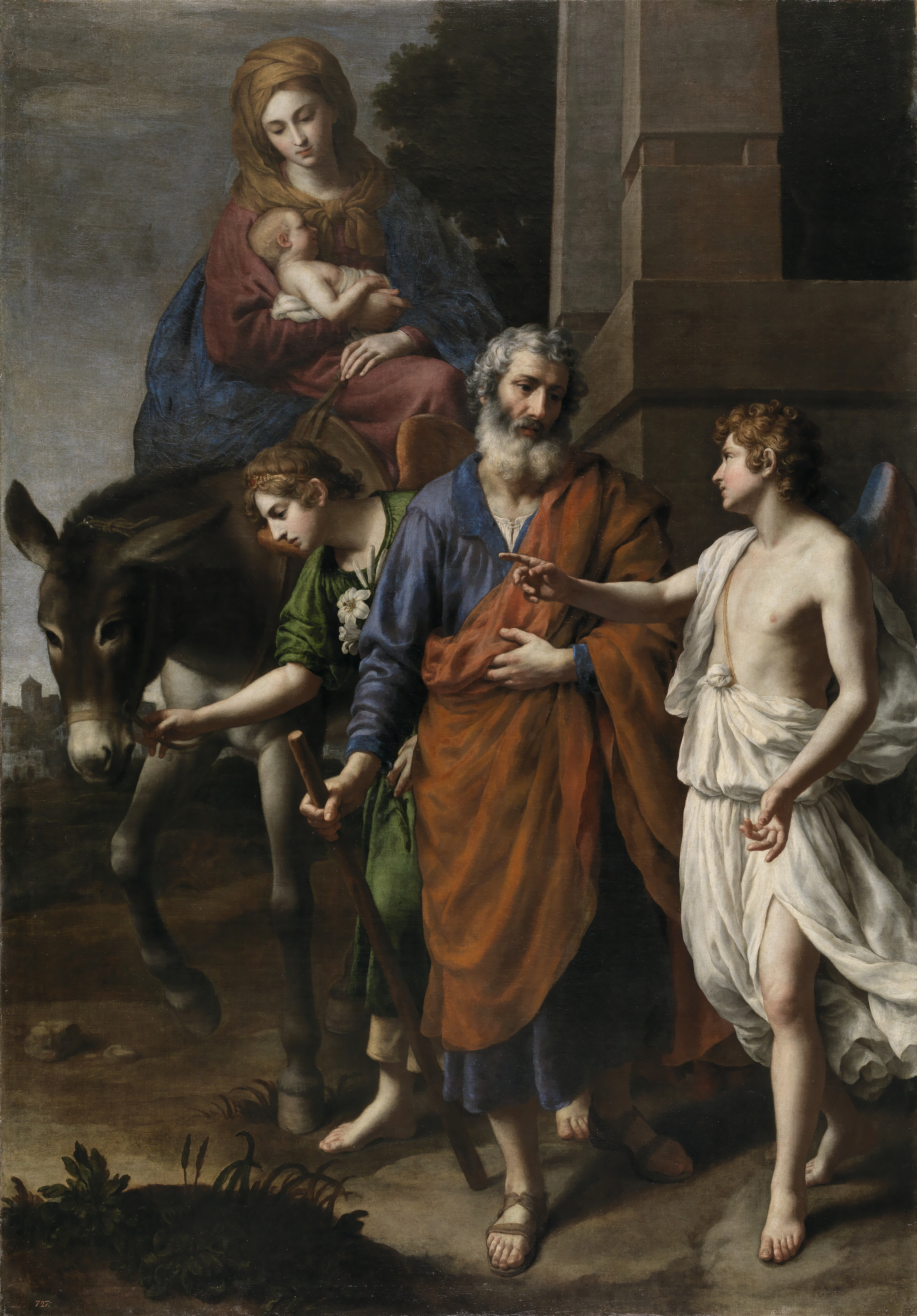 La obra representa a los tres miembros de la Sagrada Familia cristiana huyendo hacia Egipto para salvar al Niño Jesús de ser asesinado por el rey Herodes el Grande.